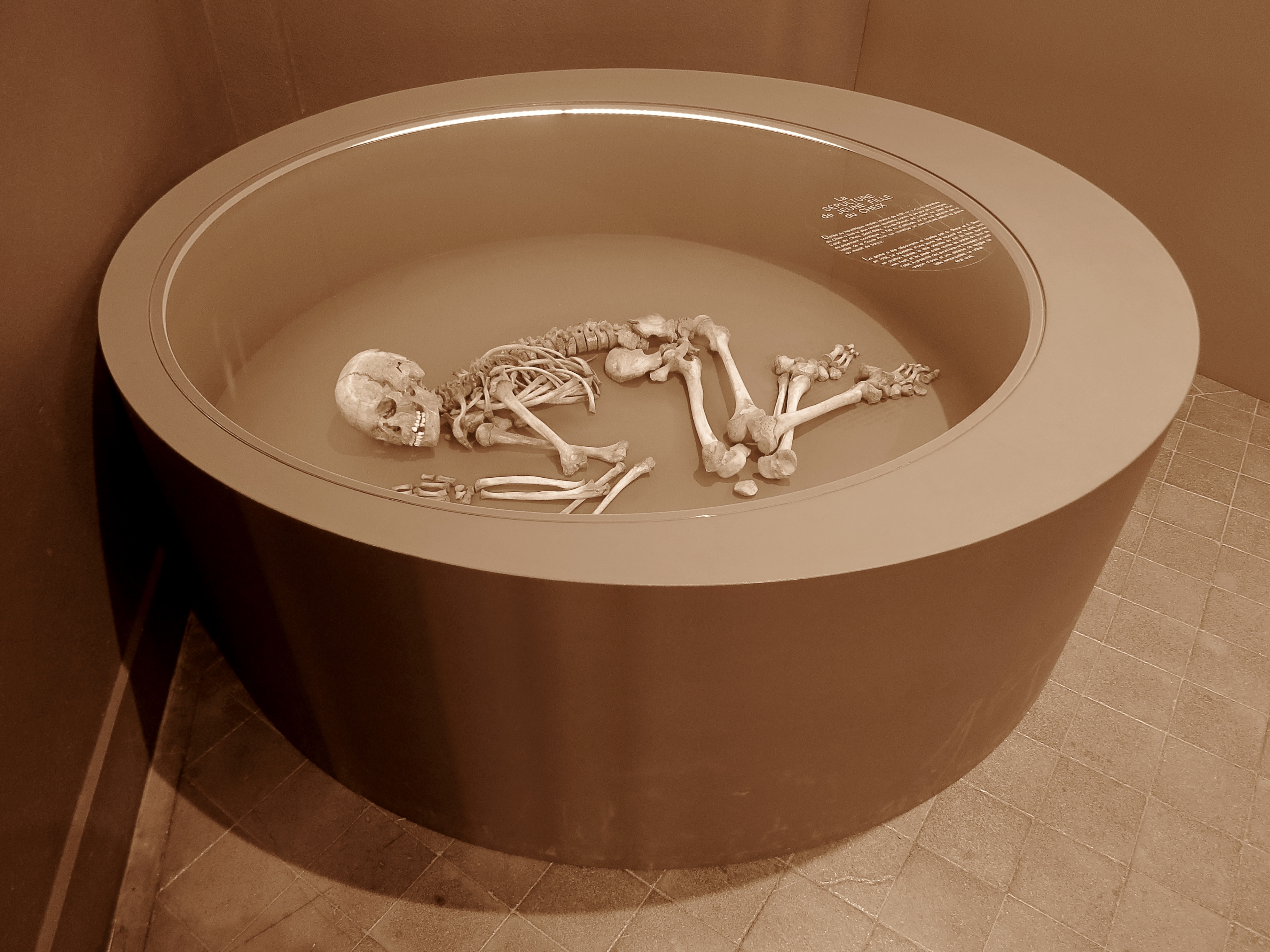 Clermont-Ferrand (Puy-de-Dôme, France) - "Jeune fille du Cheix" au musée Bargoin.Néolithique ancien (4700 av. J.-C.). Abri du Cheix (Saint-Diéry, Puy-de-Dôme, France). Découverte le 3 juillet 1938 par Georges Desrut. Dépot Desrut.